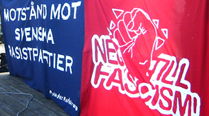 Foto: Erik Berg